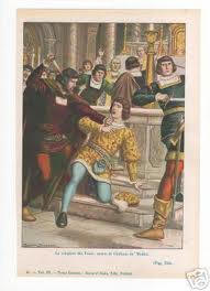 Nella stessa famiglia anche lo zio di Francesco, Jacopo fu tra i principali responsabili, e i congiurati si servirono della parentela di Guglielmo de' Medici, fratello di Francesco, con i Medici per avvicinarsi ai loro nemici segreti.Tra le cause principali della congiura venne anche individuata una questione di eredità di un altro fratello di Francesco, Giovanni de' Pazzi, al quale il Magnifico aveva dato un arbitrato sfavorevole per i Pazzi.